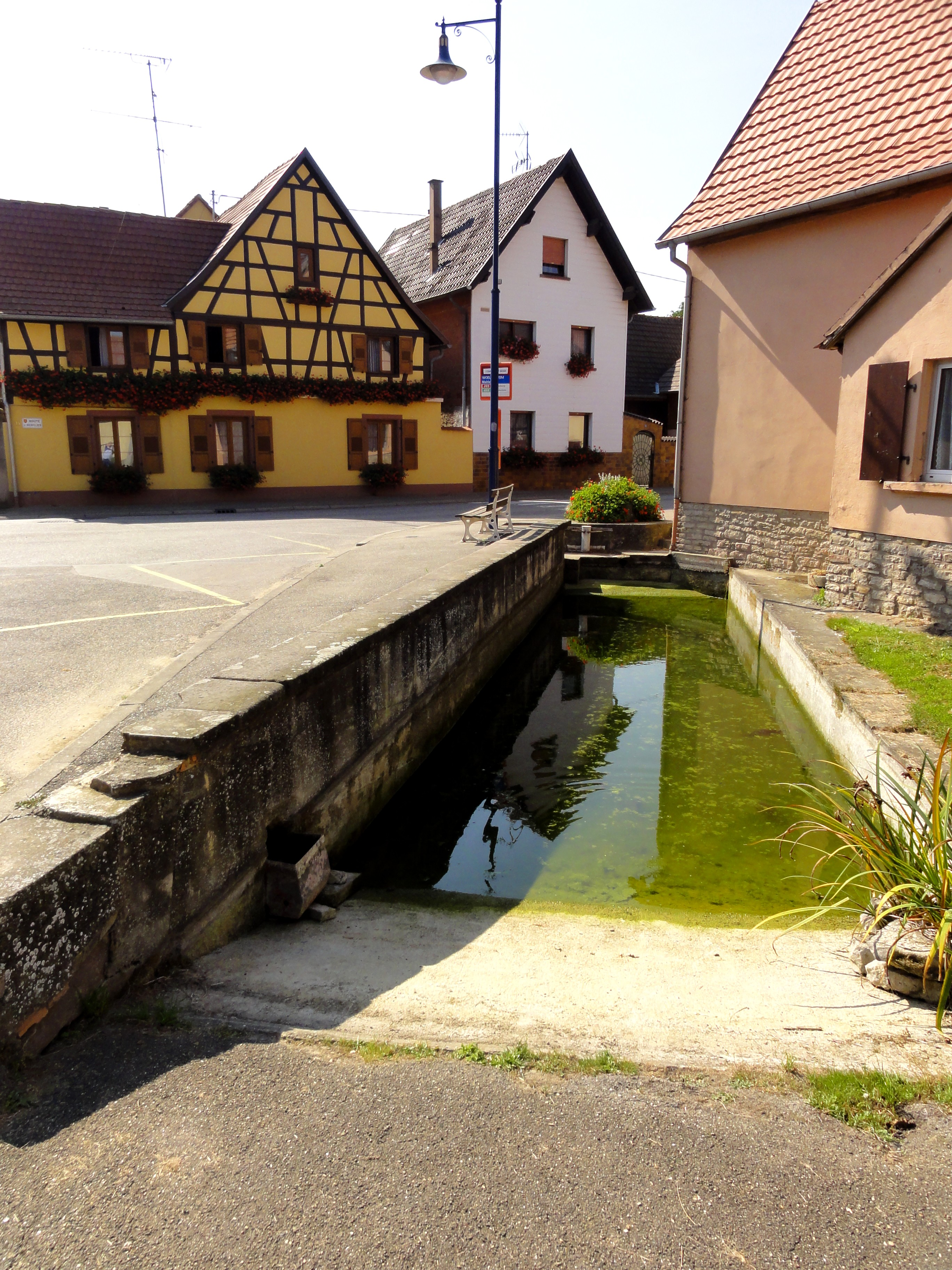 Alsace, Bas-Rhin, Woellenheim, Lavoir à chevaux (Roβschwemm)